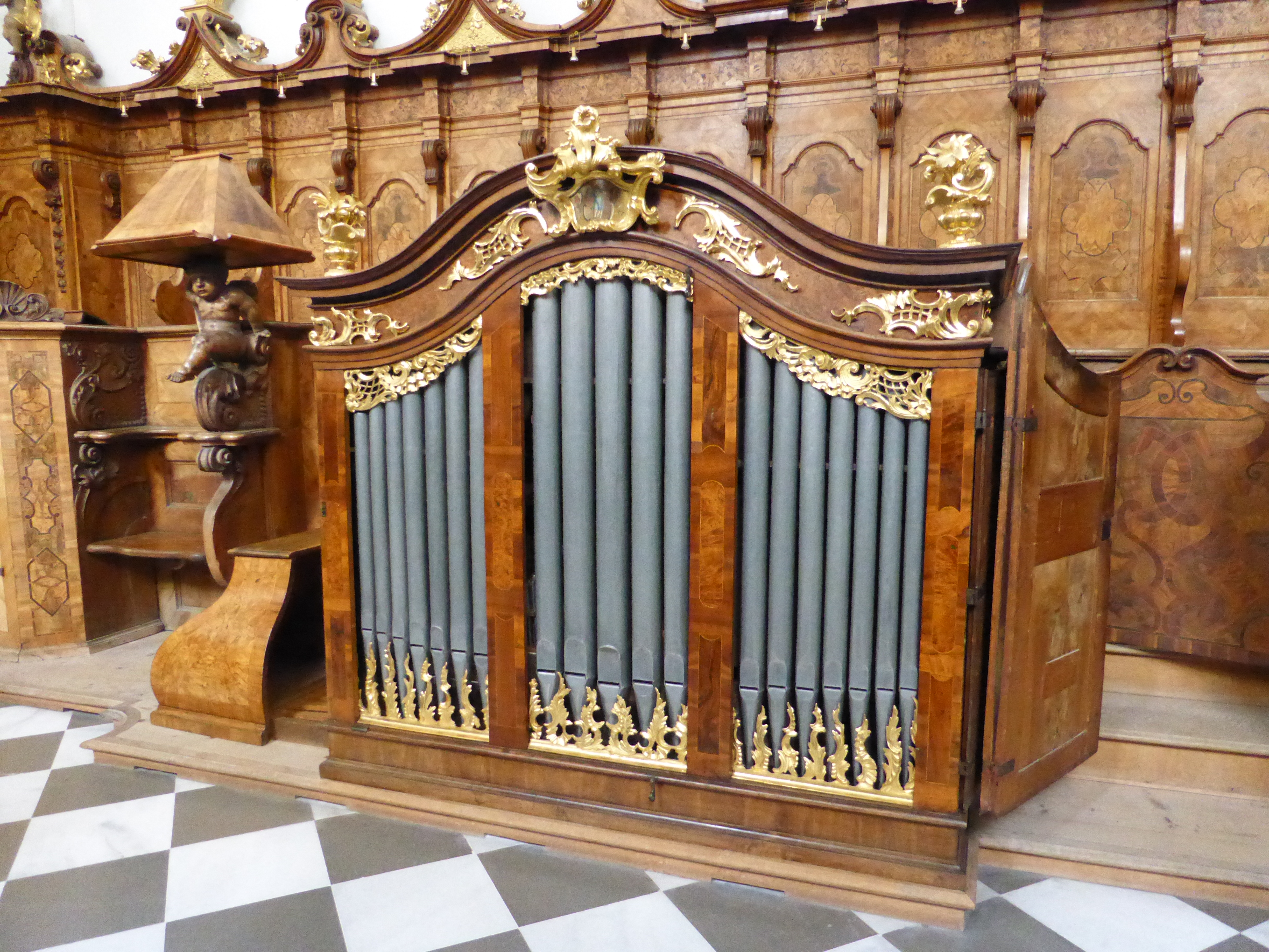 Chororgel Stift Stams von Andreas Jäger 1757, 2016 von Alois Linder restauriert